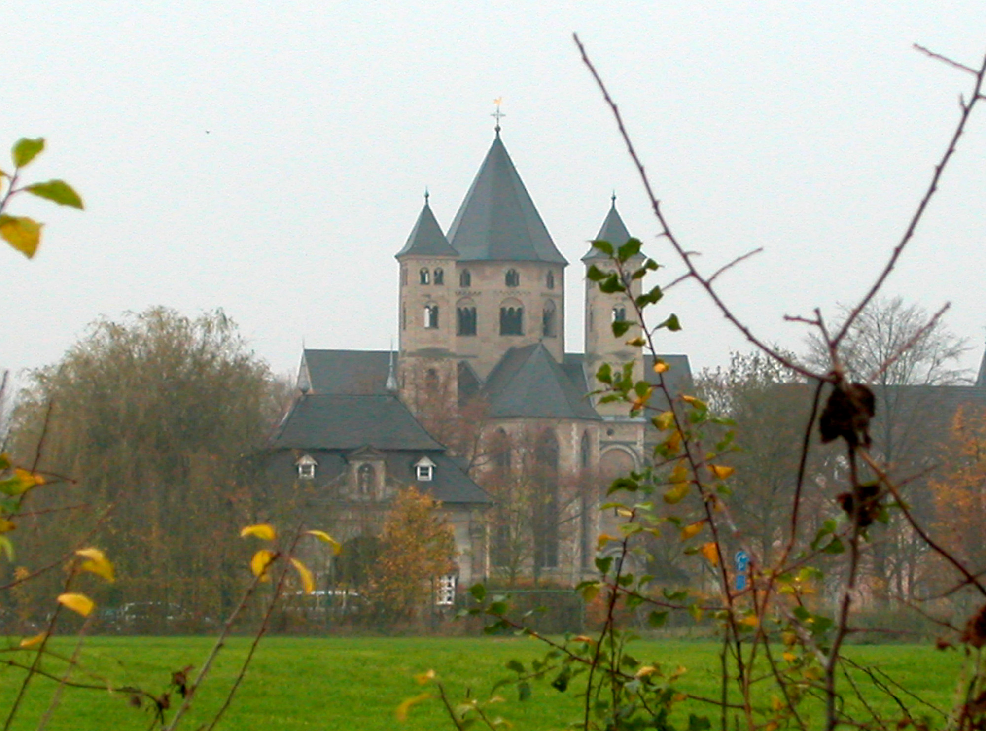 Kloster Knechtsteden bei Dormagen, NRW, Deutschland